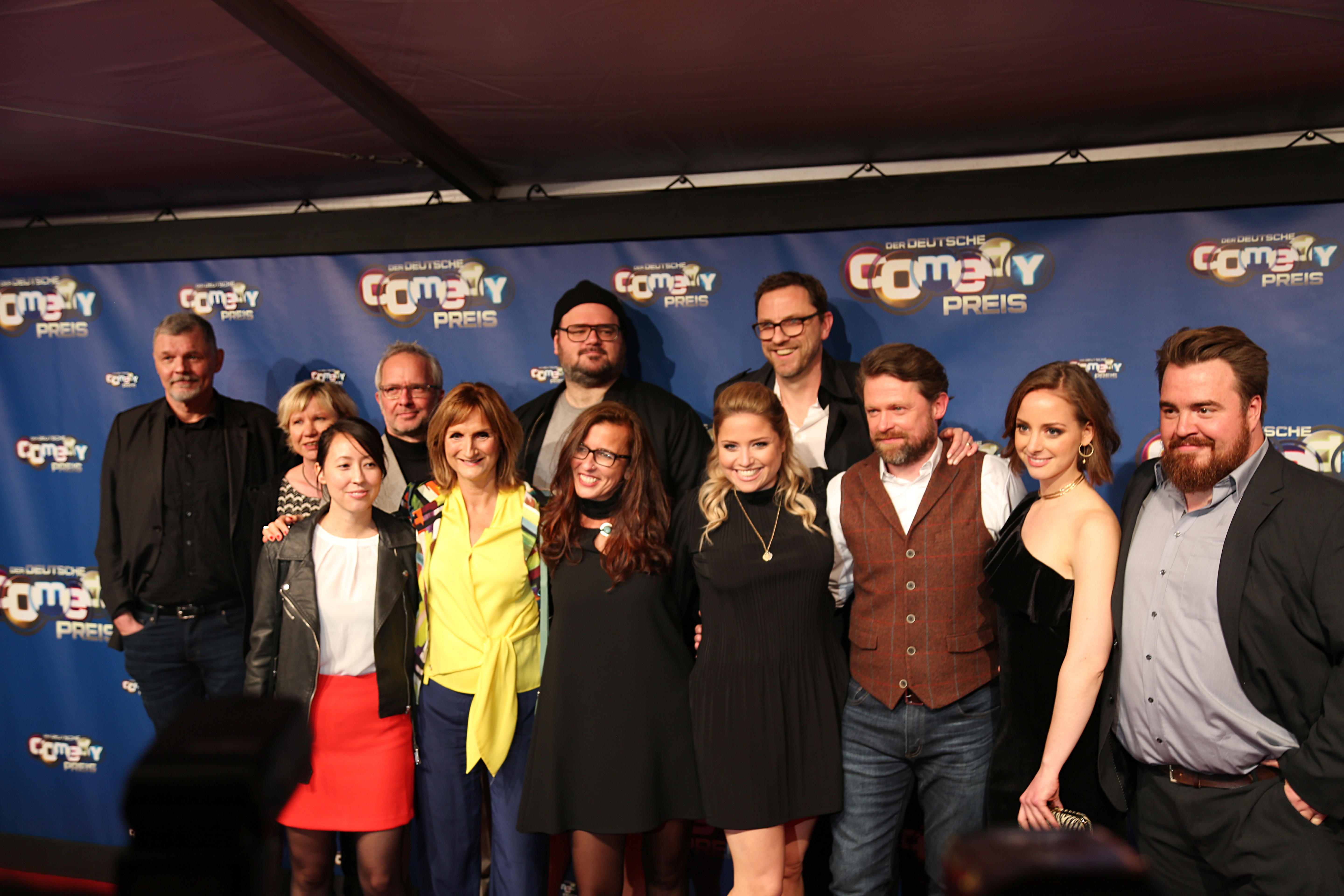 Der Cast und Mitglieder der Produktion von "Nicht tot zu kriegen" beim Deutschen Comedypreis 2017 (v. l.): Rolf Gade (?; Drehbuch), Brigitte Kohnert (Produzentin), Stefanie Ren (Drehbuch), Ralf Betz (Drehbuch), Petra Nadolny, Daniel Rakete Siegel (Regie), Natalie Schneiders (ausführende Produzentin), Caroline Frier, Uli Wilkes (Produzent), Mathias Harrebye-Brandt, Amelie Plaas-Link, Tristan Seith.